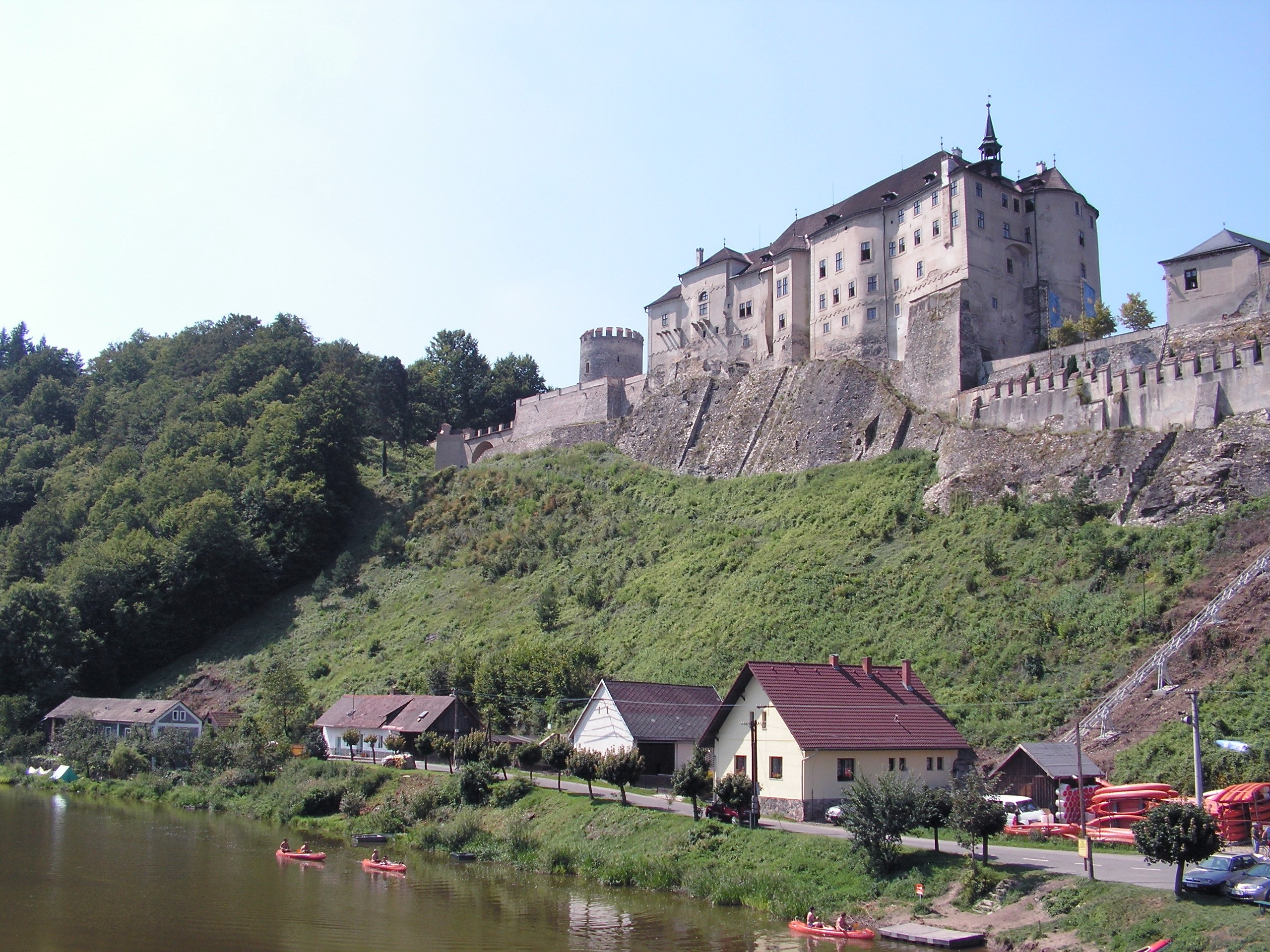 Pohled z mostu na hrad Český Šternberk